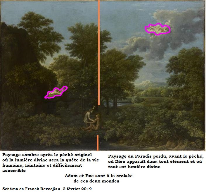 Le Printemps / Nicolas Poussin / Les Saisons / Paradis perdu